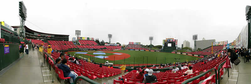 2006年3月に完成した第二期のフルキャストスタジアム宮城。 撮影日は2006年9月18日(東北楽天対北海道日本ハム)。 投稿者により撮影。 2006年9月21日 (木) 15:38 . . Gomurafuji . . 800×269 (38,045 バイト)